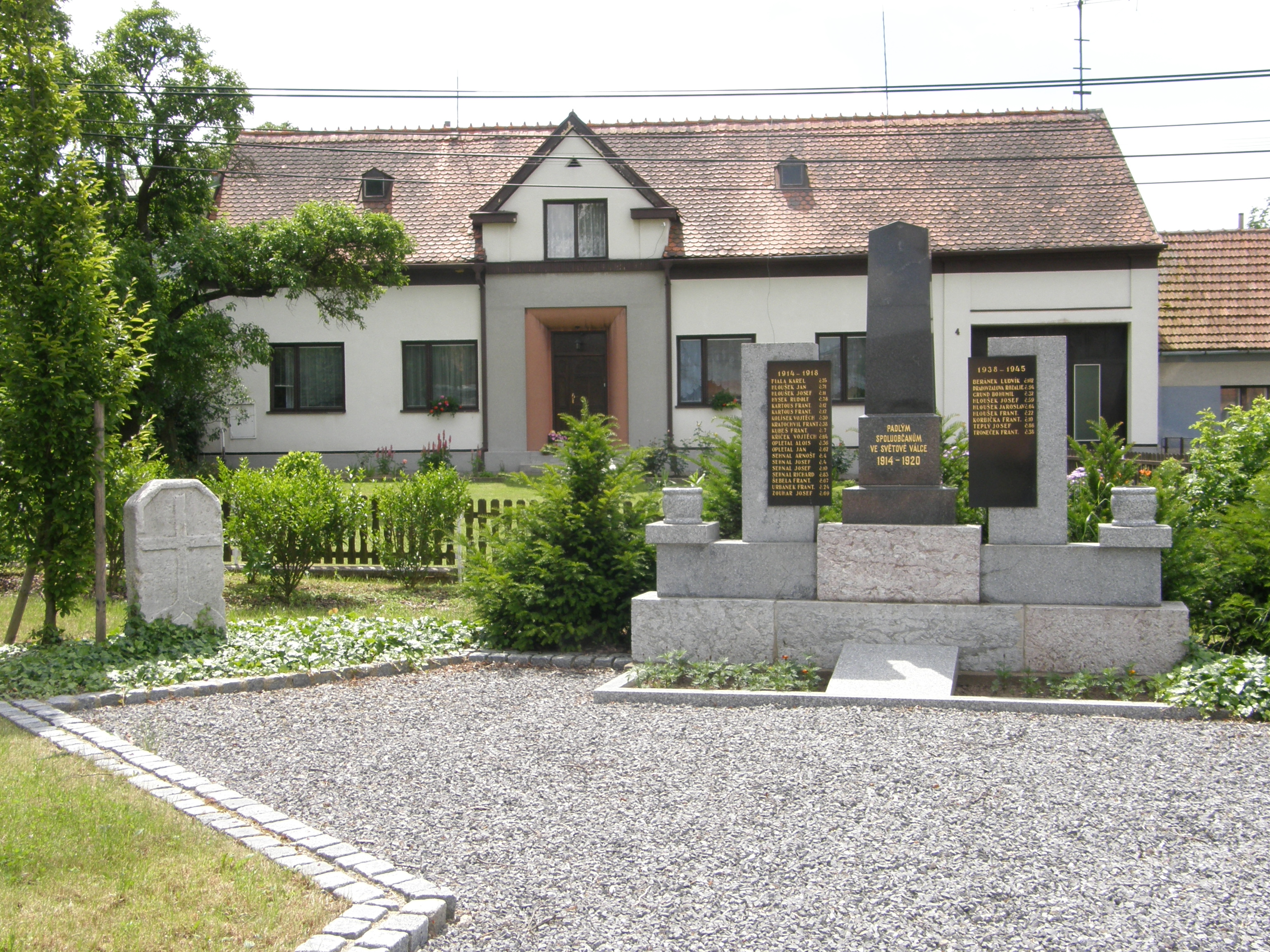 Památník padlým občanům ve světových válkách v Habrůvce